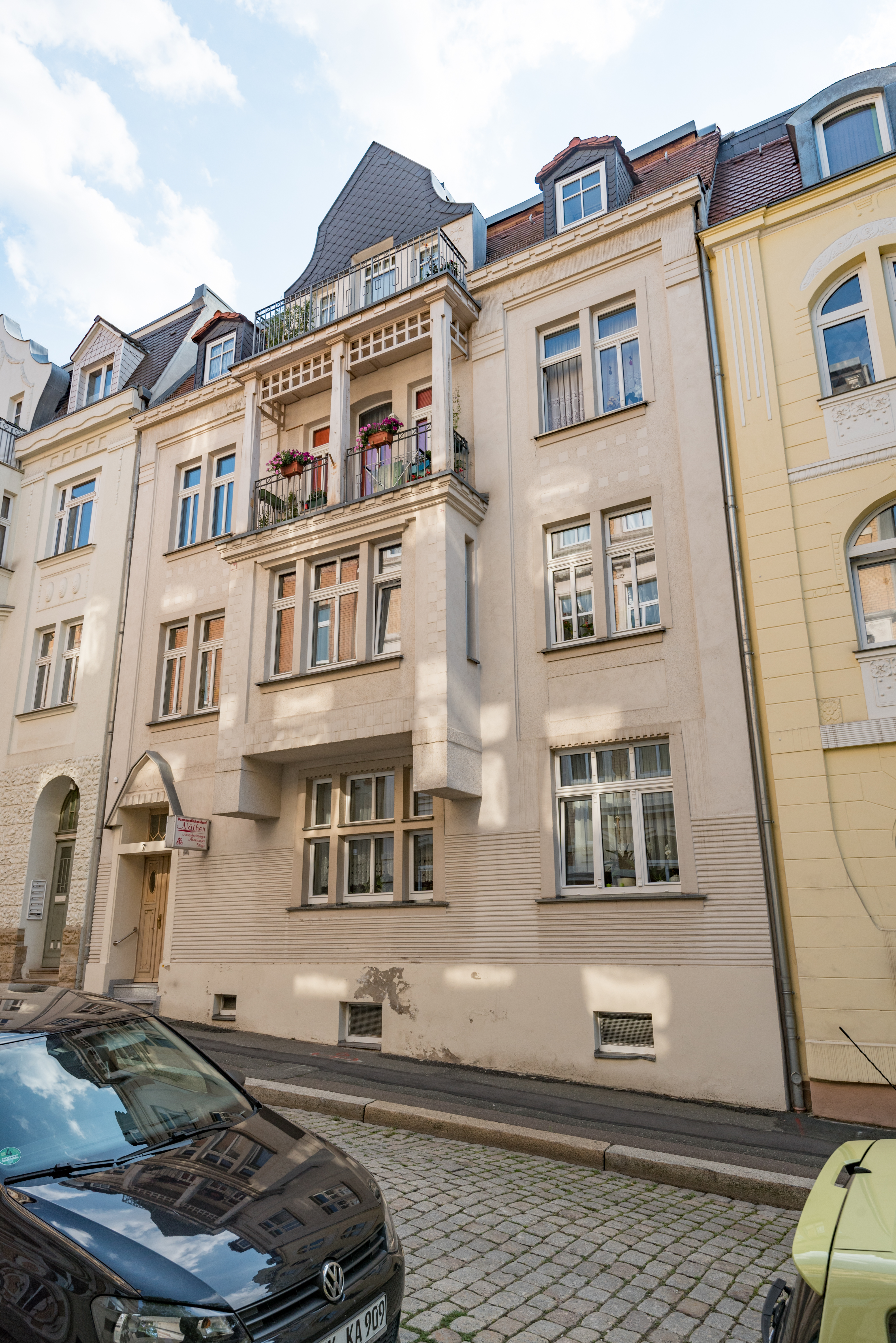 Zeitz, Einsteinstraße 7